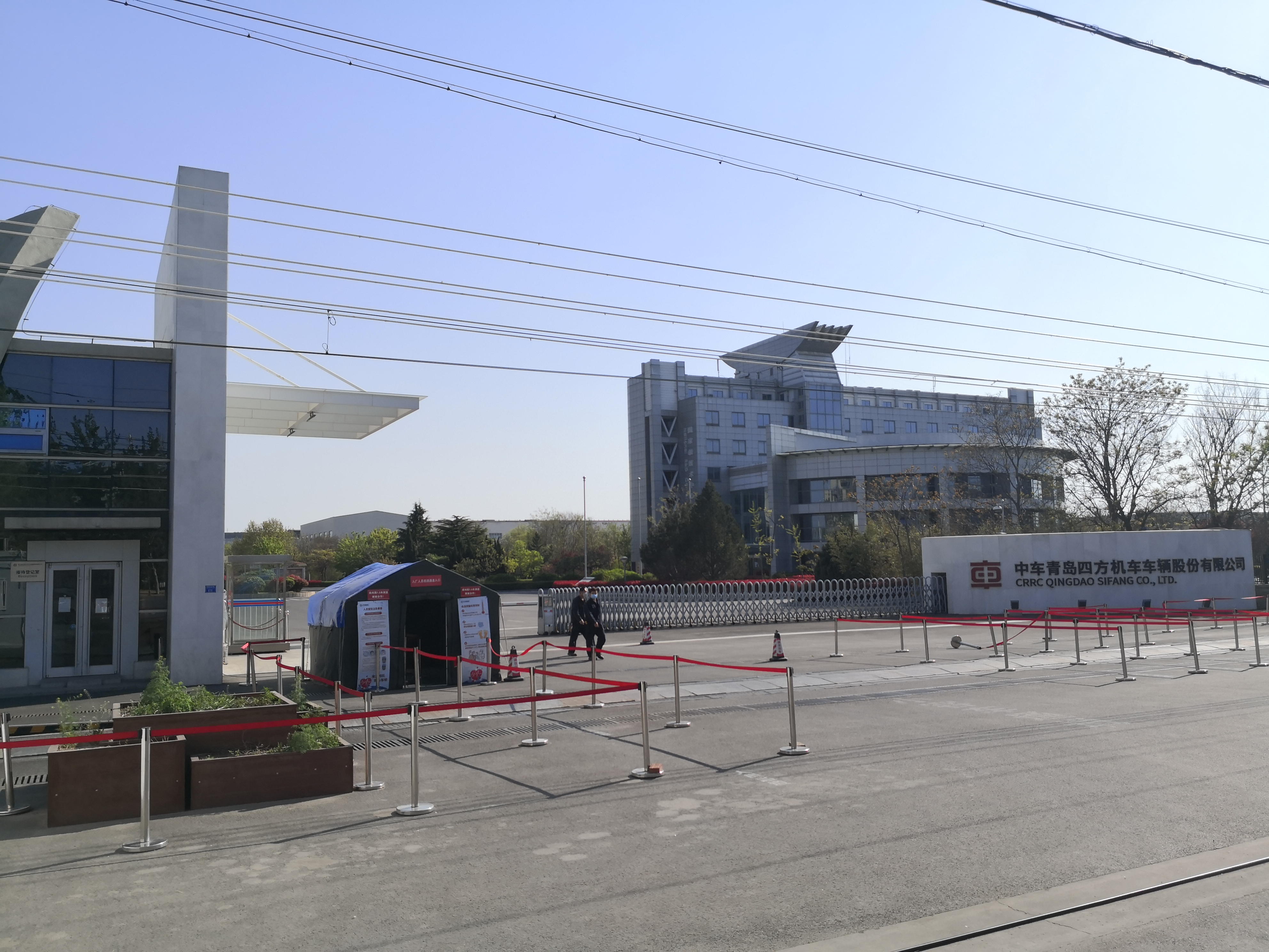 中车青岛四方机车车辆股份有限公司棘洪滩制造基地1号门